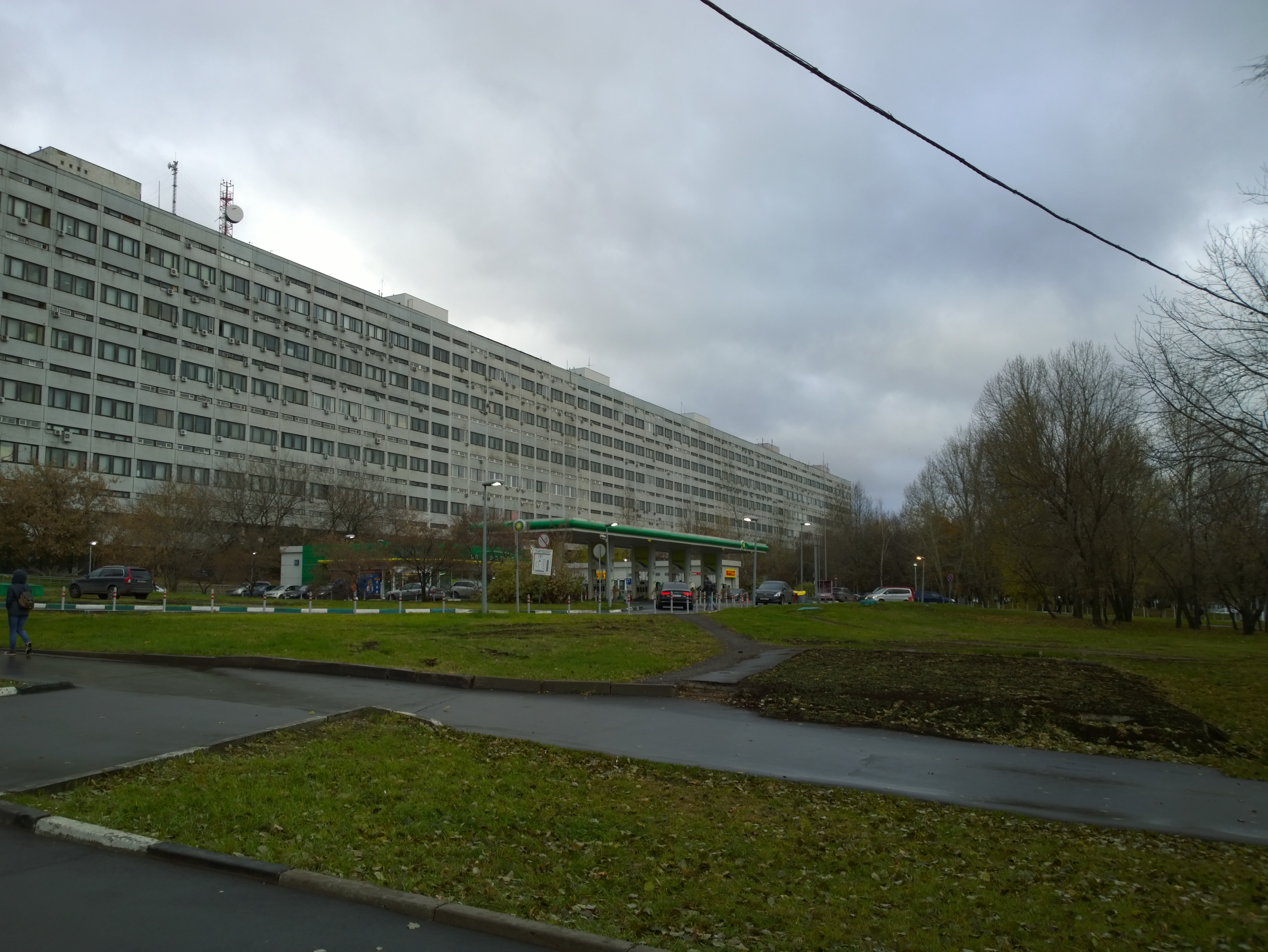 Институт космических исследований